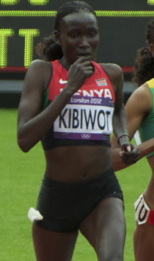 Women's 5000m, Viola Jelagat Kibiwot, Meseret Defar, Tirunesh Dibaba